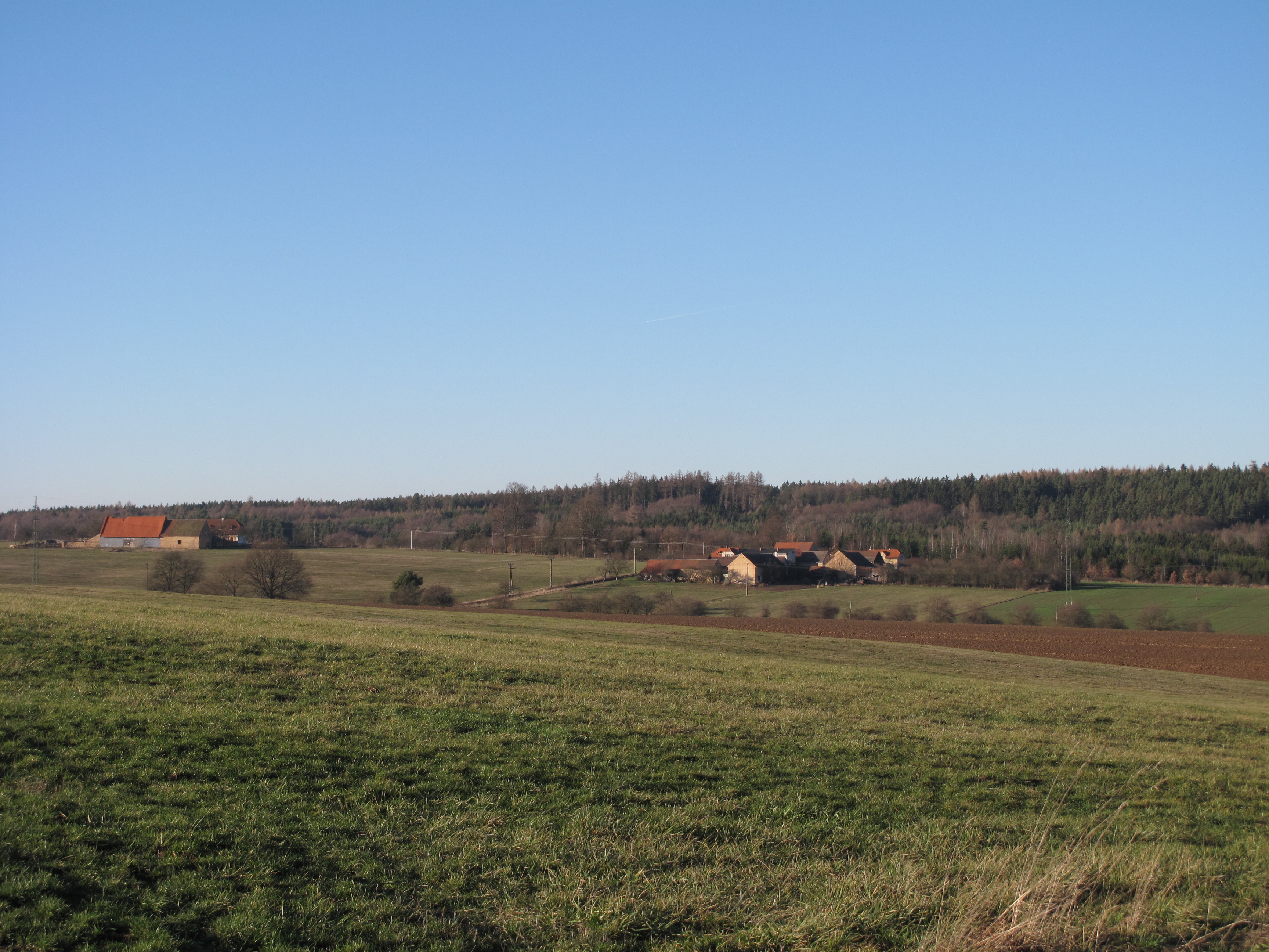 Pohled z dáli na Háje. Okres Domažlice, Česká republika.